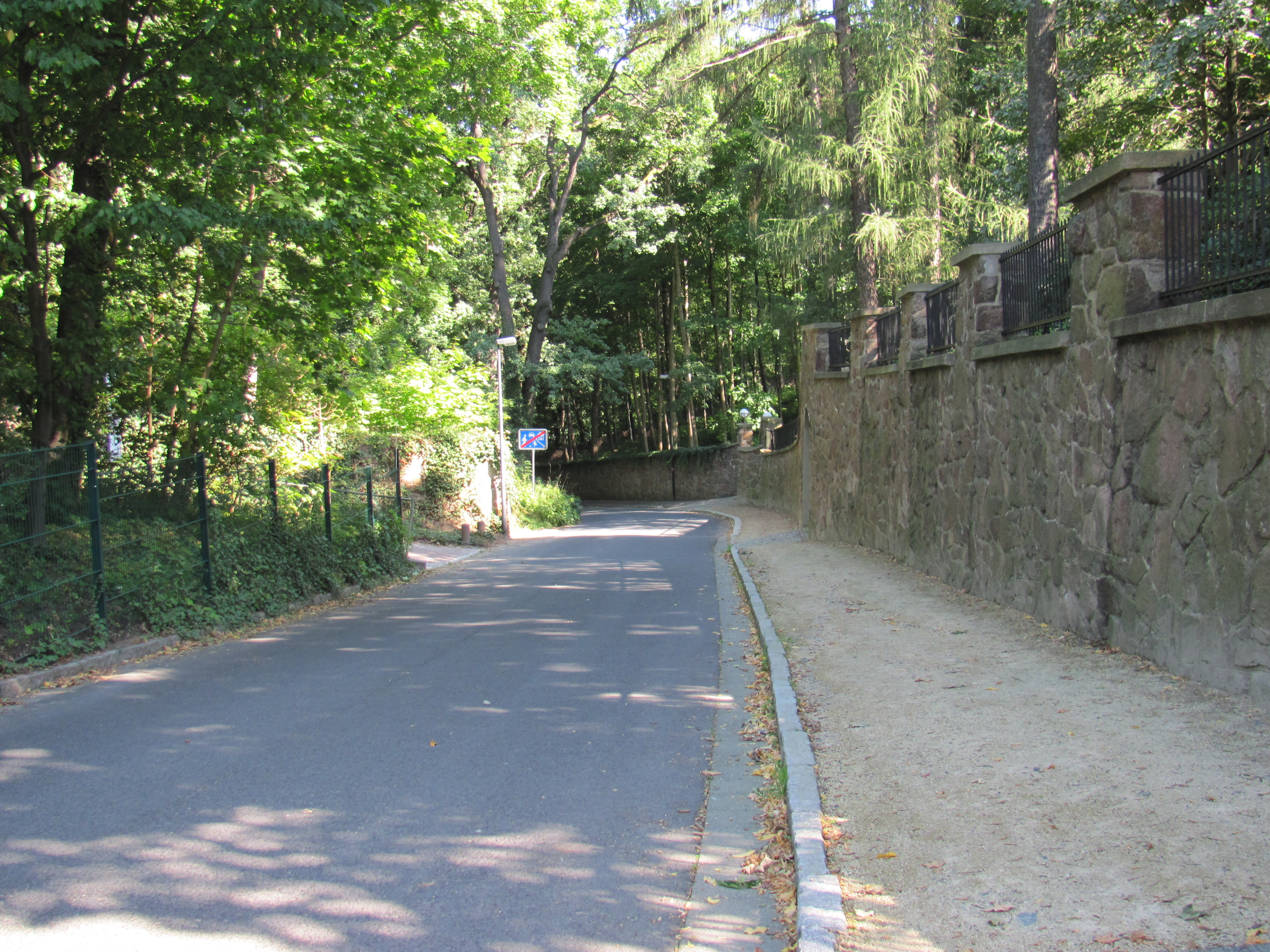 Radebeul Mohrenstraße, rechts die Stützmauer zum Grundstück mit dem Mätressenschlösschen